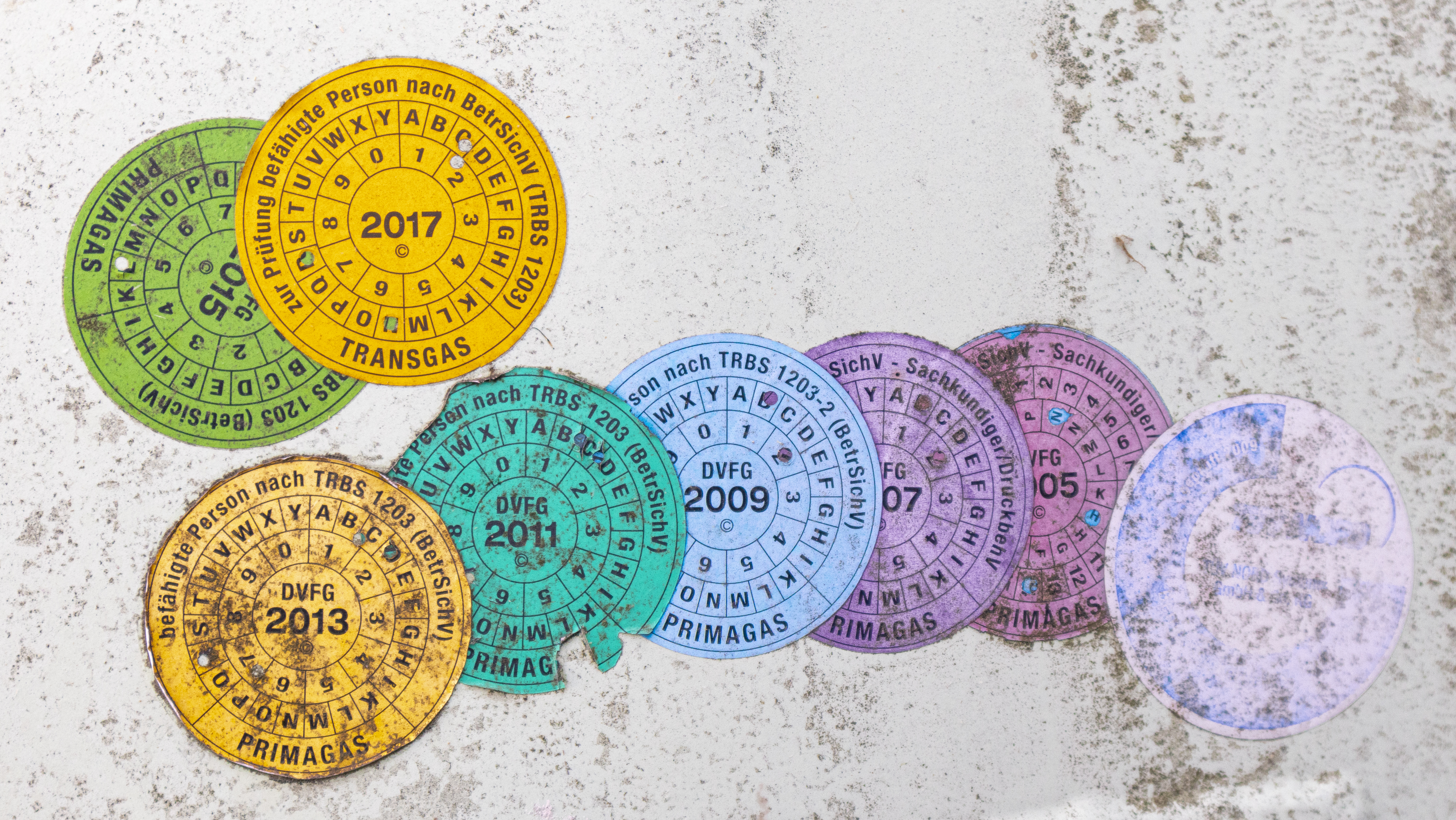 Insel Poel